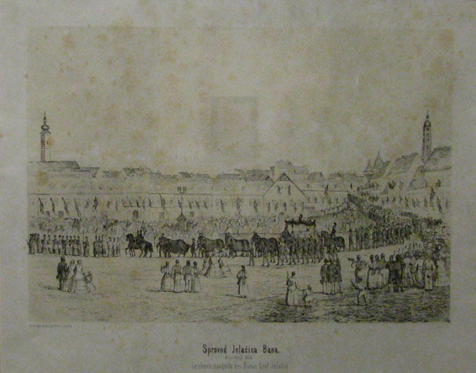 Litografija Sprovod bana Josipa jelačića, posmrtna povorka prolazi preko Trga bana Jelačića u Zagrebu 26. svibnja 1859., snimljeno u Muzeju grada Zagreba